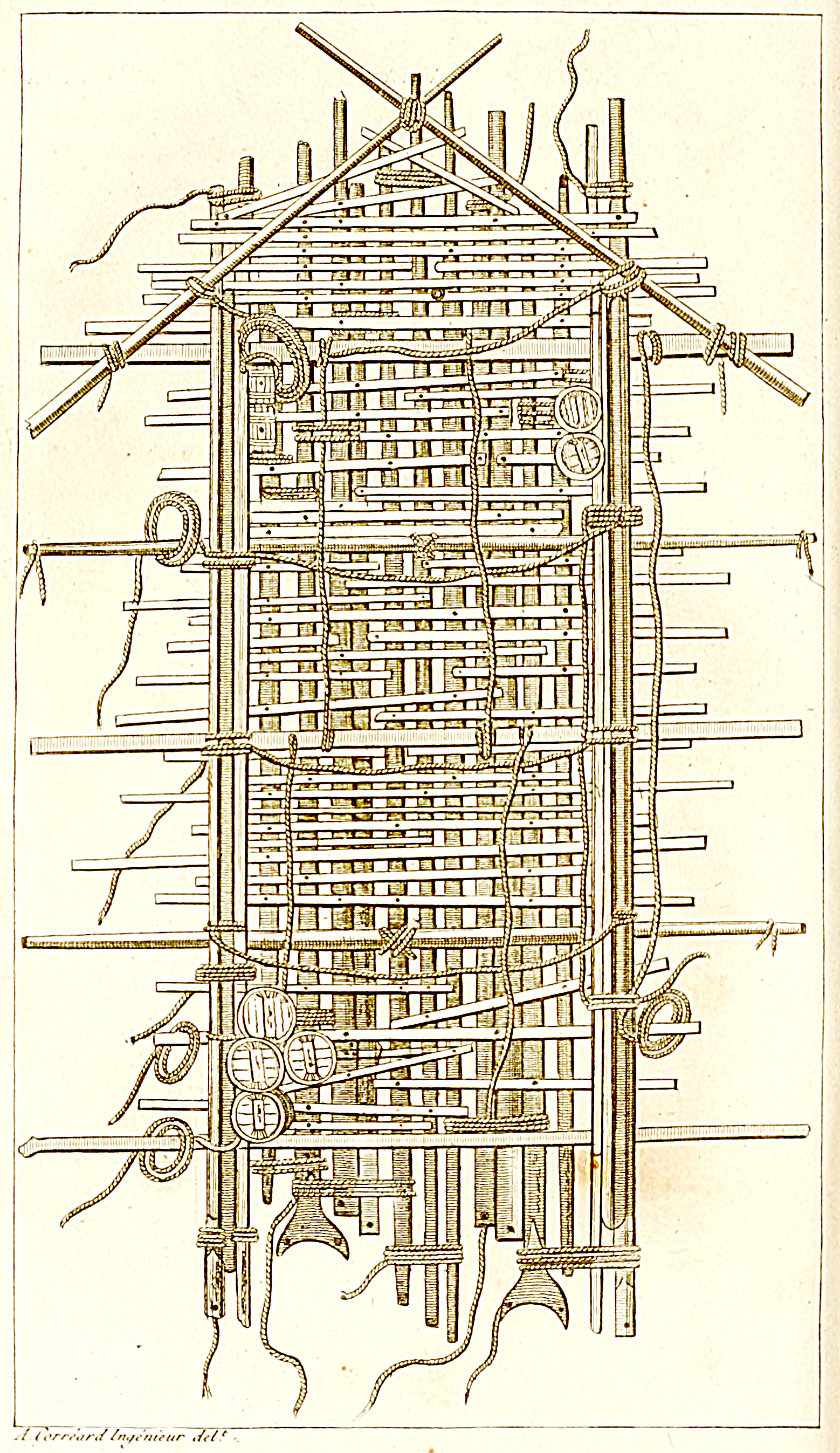 Vue en plan du radeau de la Méduse, Illustration réalisée par l'ingénieur-géographe Alexandre Corréard.